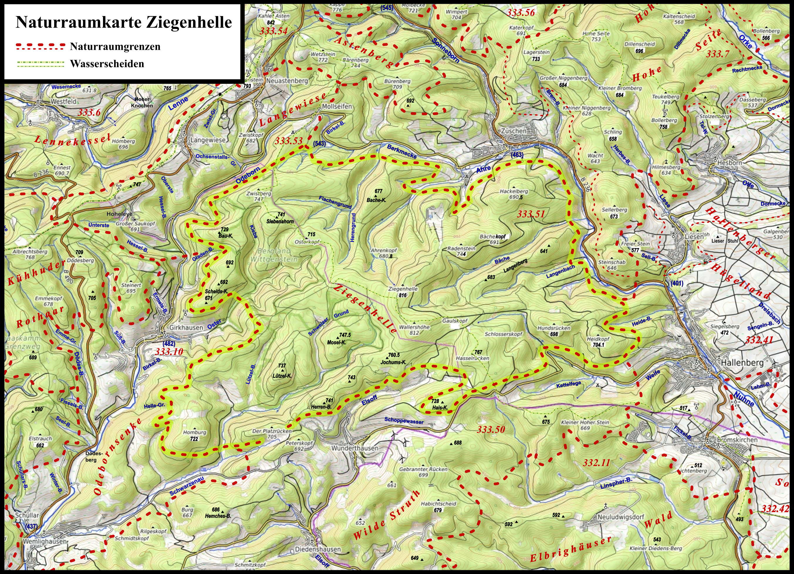 Naturraumkarte der bis 816 m hohen Ziegenhelle nordwestlich Hallenbergs im Rothaargebirge nebst Nachbarnaturräumen; die "Konkurrenzberge" Kahler Asten (842 m, westlicher Norden) und Bollerberg (758 m, Nordosten) sind im Ausschnitt enthalten.